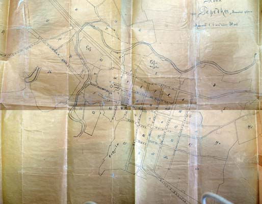 Беларуская (тарашкевіца): Гарадок (Haradok). Плян места